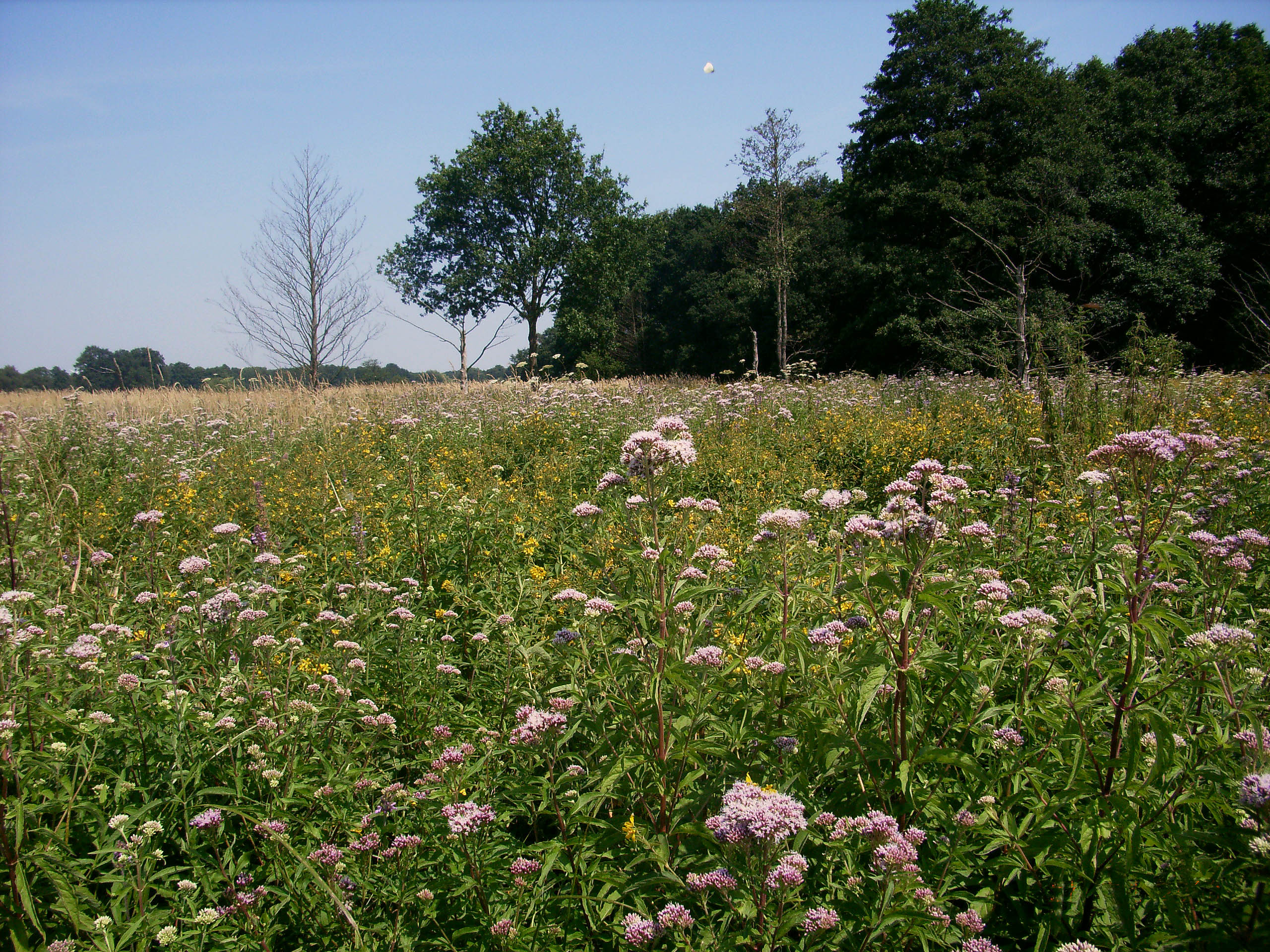 Feuchte Hochstaudenflur mit Wasserdost (Eupatorium cannabinum) und Gilbweiderich (Lysimachia sp.) in einer Feuchtwiesenbrache, Nordwestdeutschland